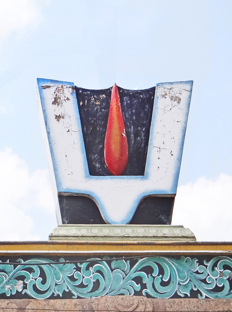 Le signe du Dieu, à l'entrée du site Amma Mandapam Place est sur les rives du fleuve Cauvery, l'un des fleuves sacrés de l'Inde. Ce site proche du temple de Srirangam est dédié à Vishnou, c'est le lieu de crémation.